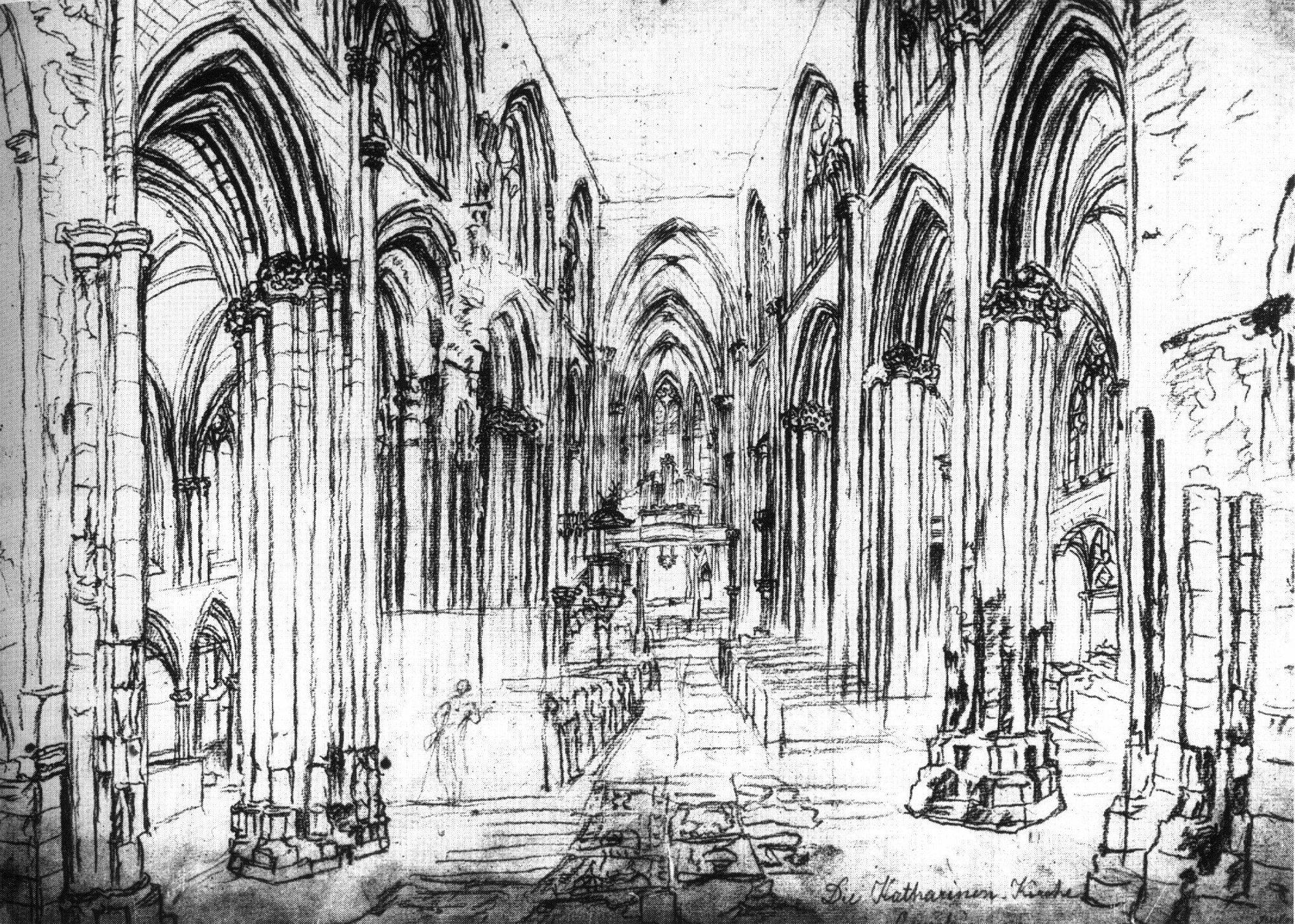 Innenansicht der Katharinenkirche Oppenheim als Ruine